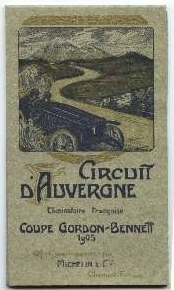 Guide vert touristique Michelin première édition, couverture